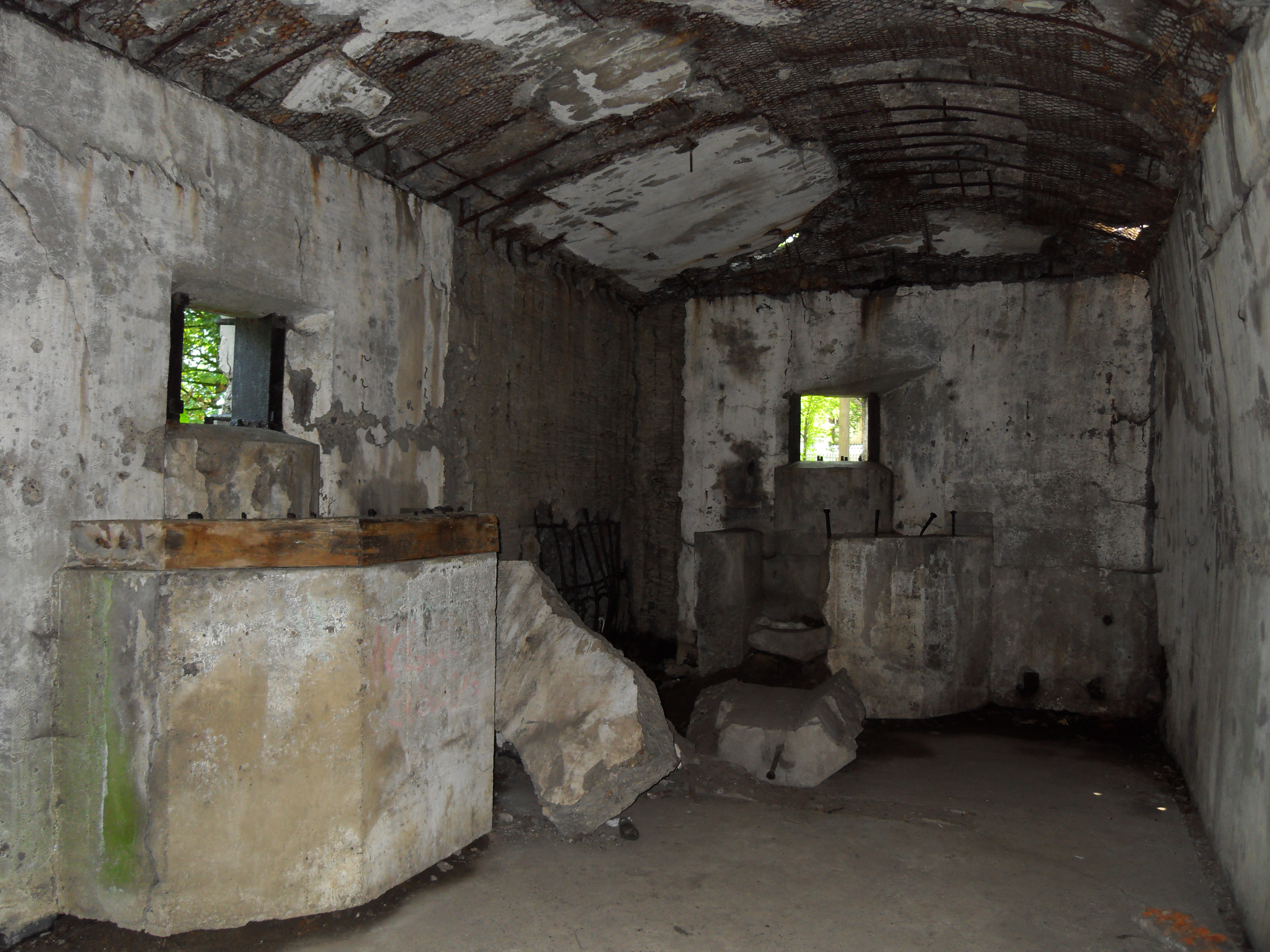 Gdańsk Westerplatte. Suterena nowych koszar, kabina bojowa.